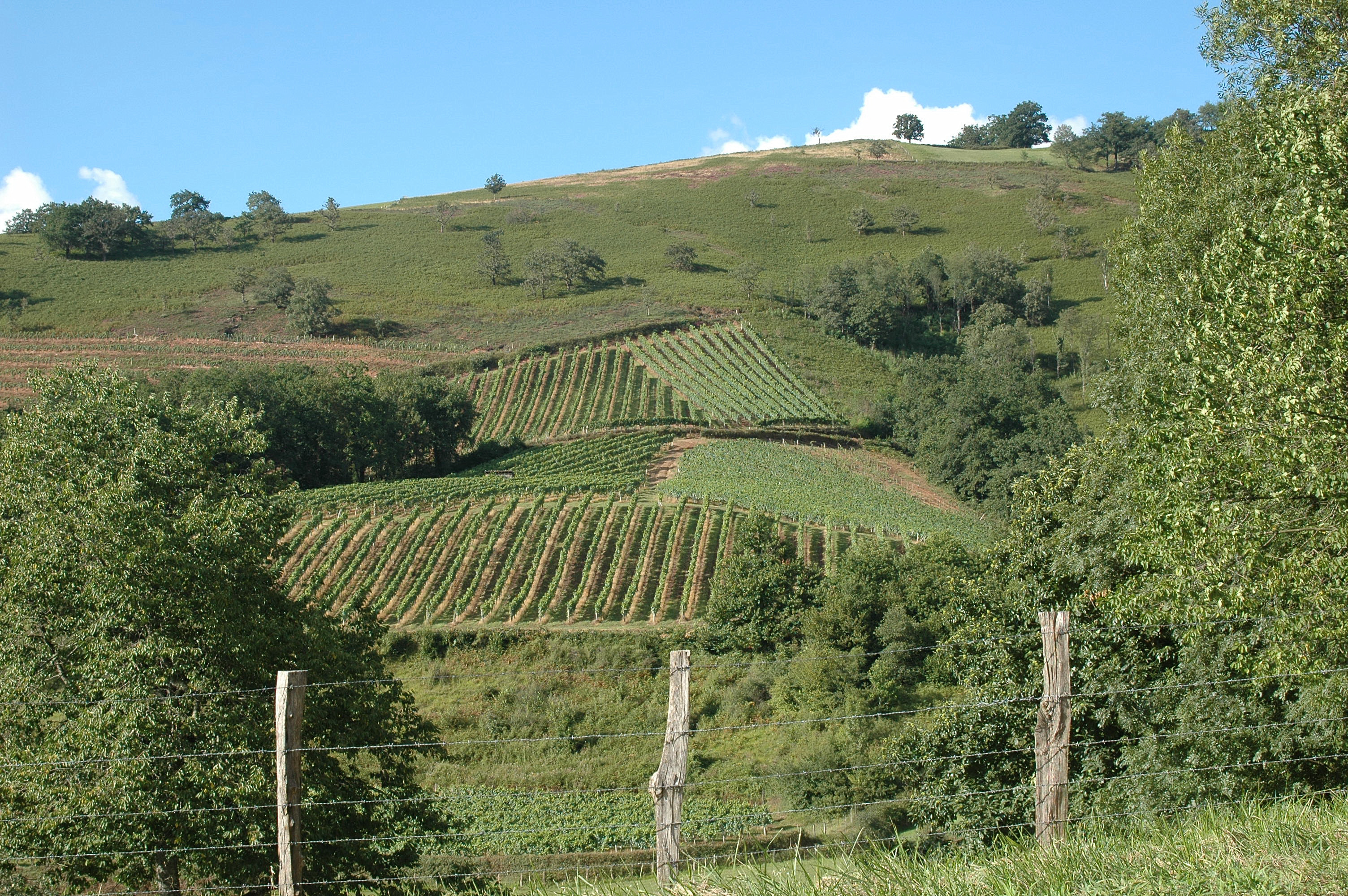 Saint-Étienne-de-Baïgorry, vignoble d'Irouléguy. Photo prise le 03/08/06 par Harrieta171 Vineyards of southwestern France